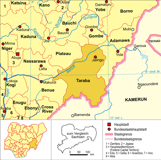 Politische Karte Nigerias (Bundesstaat Taraba hervorgehoben)